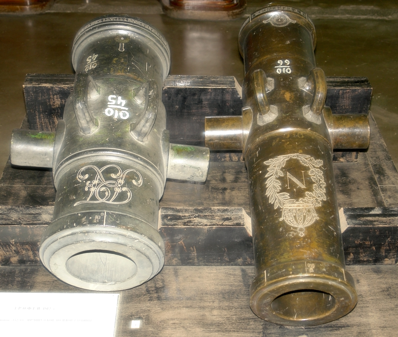 Трофеи 1812 г. (слева направо) Ствол 6-дюймовой 152-мм французской полевой гаубицы. Бронзовый ствол, Длина 95 см, вес 352 кг. Изготовлен 7 августа 1793 в Страстбурге (комиссар Даршен) 24-фунтовая (152-мм) французская полевая гаубица. Бронза. 101 см. Масса 278 кг. Изготовлено в 1805 году в Дуэ (мастер Беранже). Военно-исторический музей артиллерии, инженерных войск и войск связи, Санкт-Петербург.